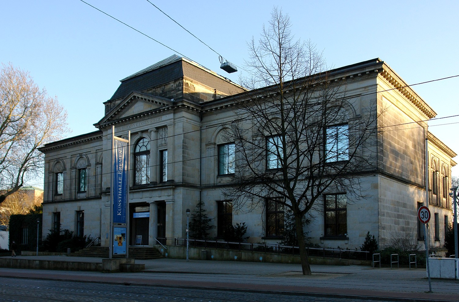 Kunsthalle Bremen. Haupteingang Am Wall 207 Das abgebildete Objekt ist ein geschütztes Kulturdenkmal in der Freien Hansestadt Bremen, mit der Nr. 0084 beim Landesamt für Denkmalpflege registriert.